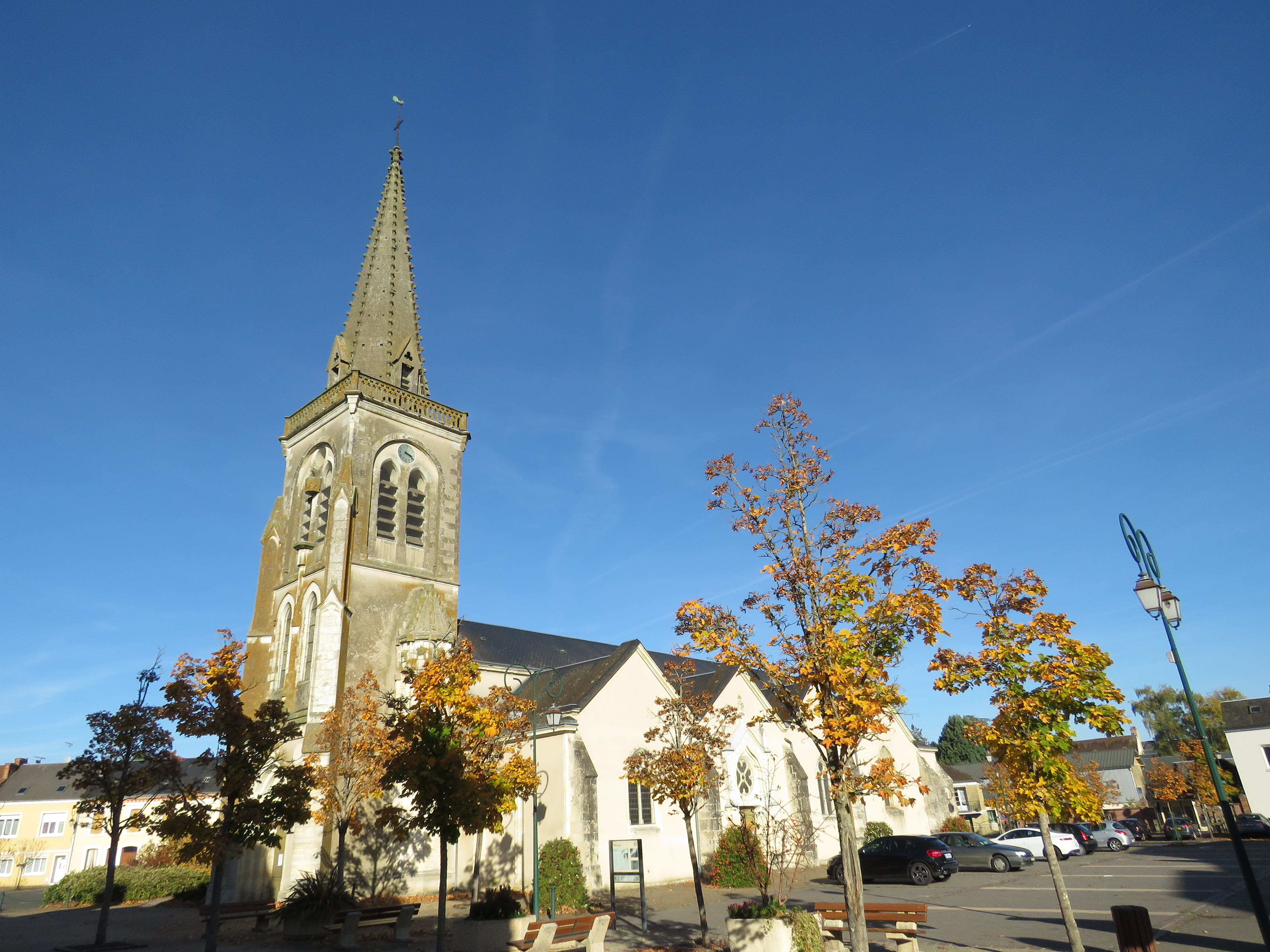 Église